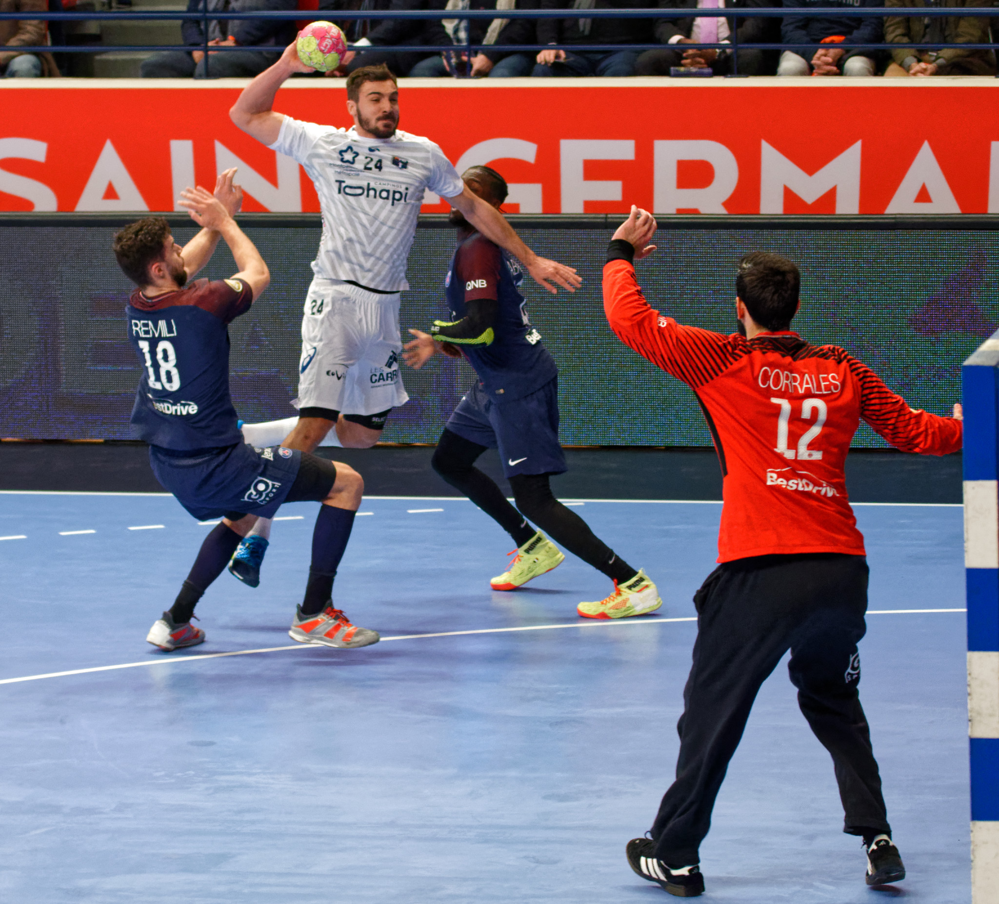 Rencontre de championnat entre le PSG et Montpellier. A Coubertin, le 1er mars 2018.